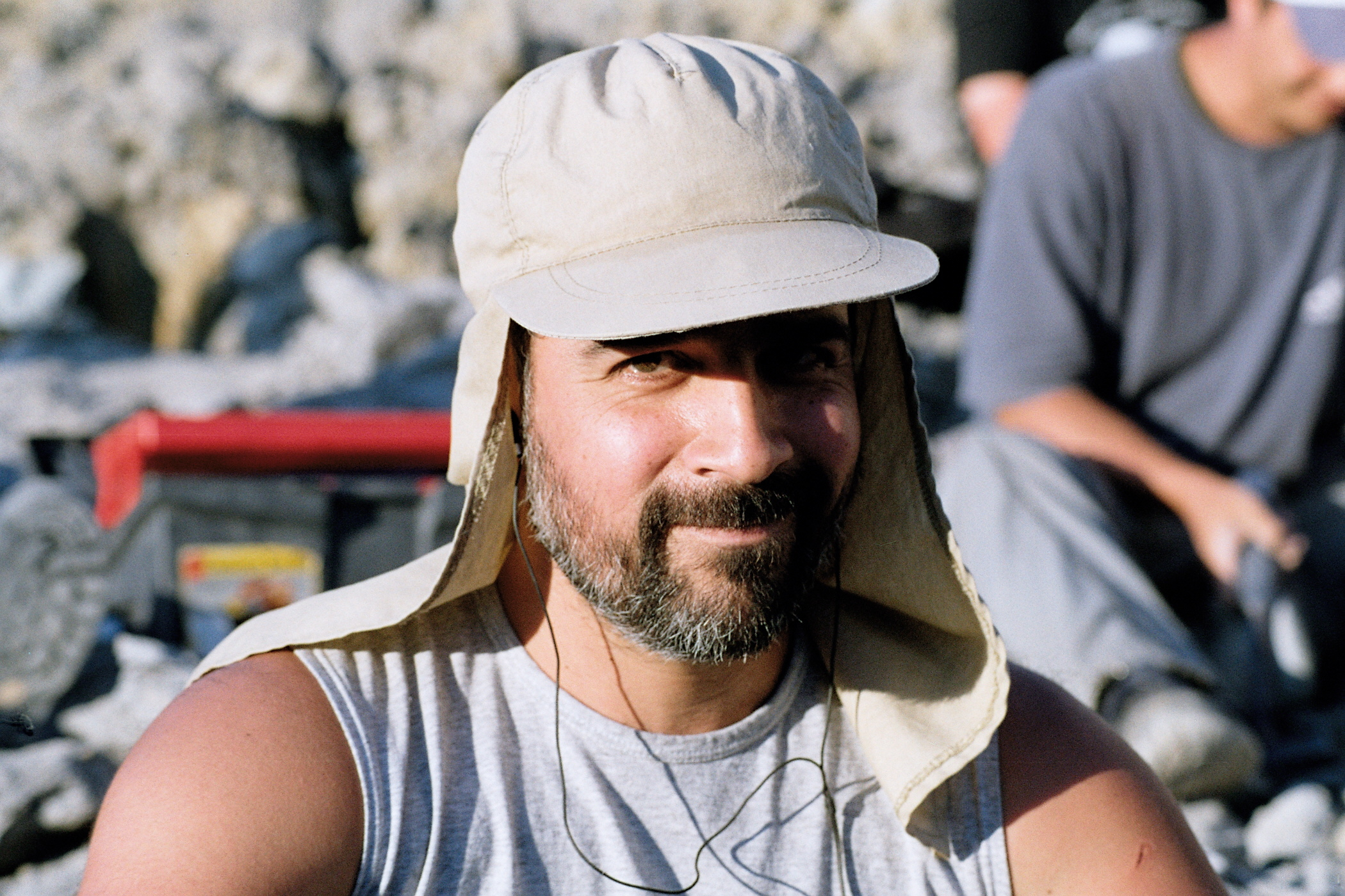 Apesteguia en Iharkut, Hungría